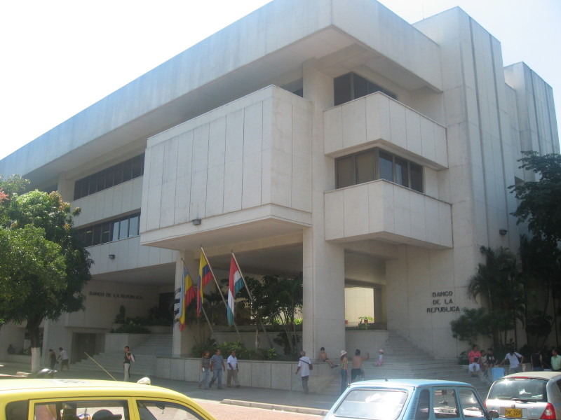 Banco de la Republica-Girardot (Cundinamarca) / Colombia